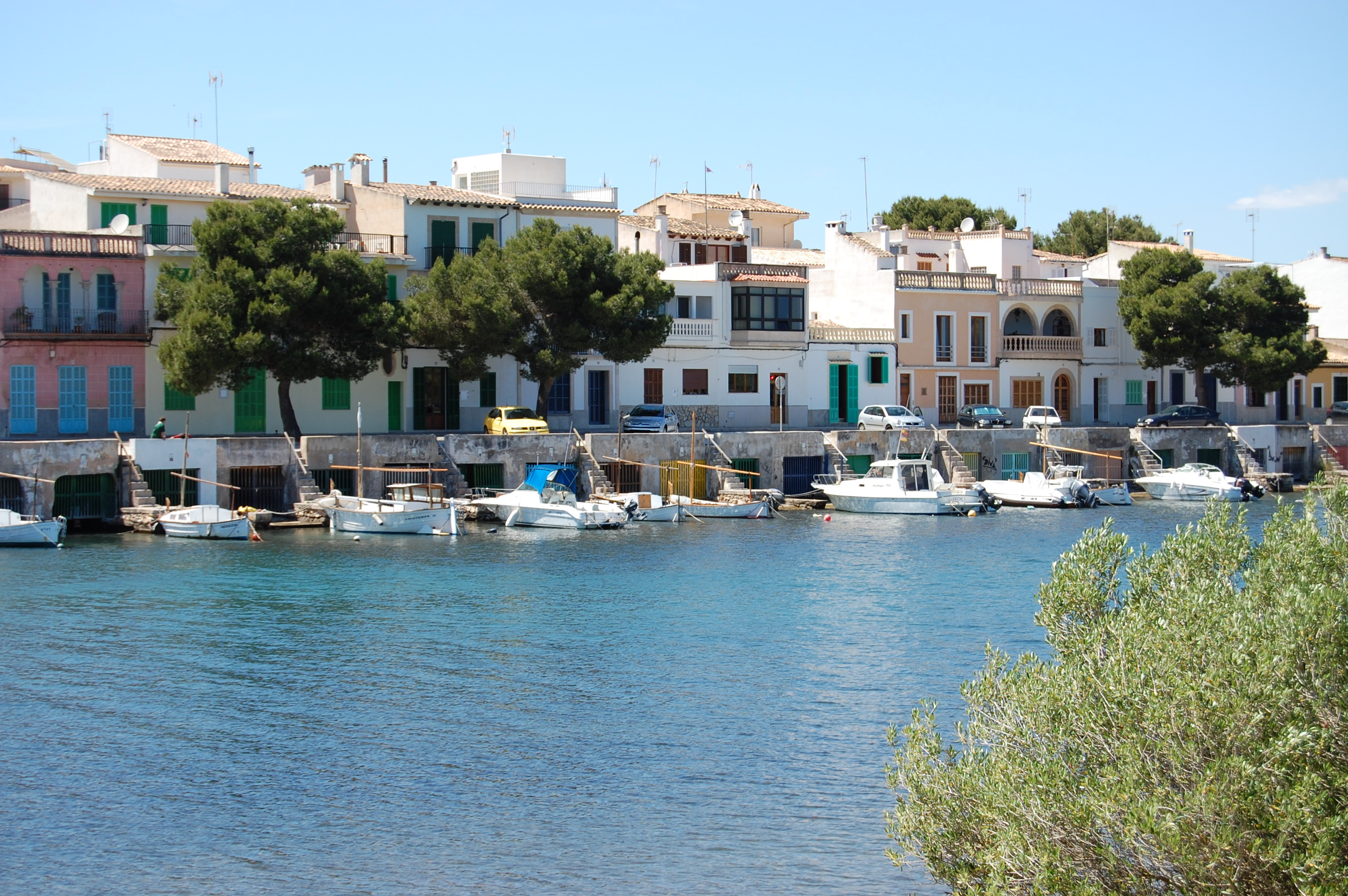 alter Hafen von Portocolom